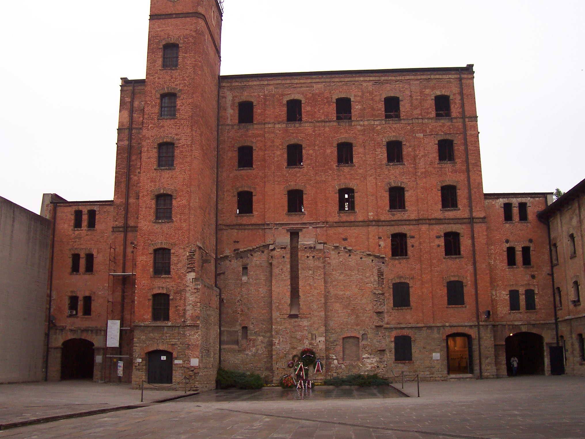 Risiera di San Sabba a Trieste: l'edificio che ospitava il forno crematorio. Source photographed by myself Photographer Pier Luigi Mora Date 30 October 2005 Camera Data Camera Kodak CX6330 zoom digital camera